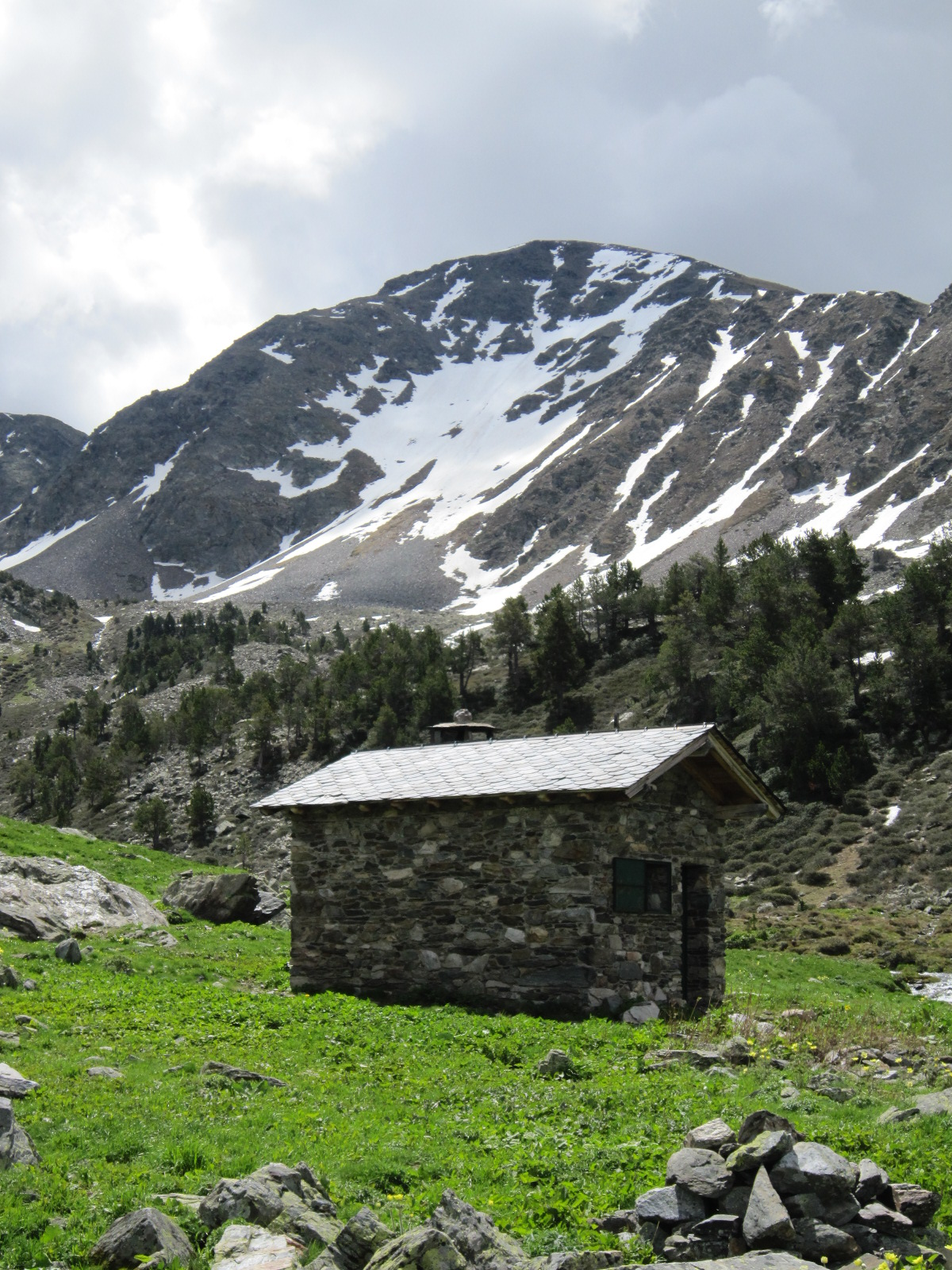 Cabana de la Serrera amb el Pic de la Serrera al fons